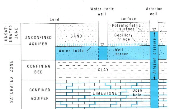 ภาพแสดงชนิดของชั้นหินอุ้มน้ำ